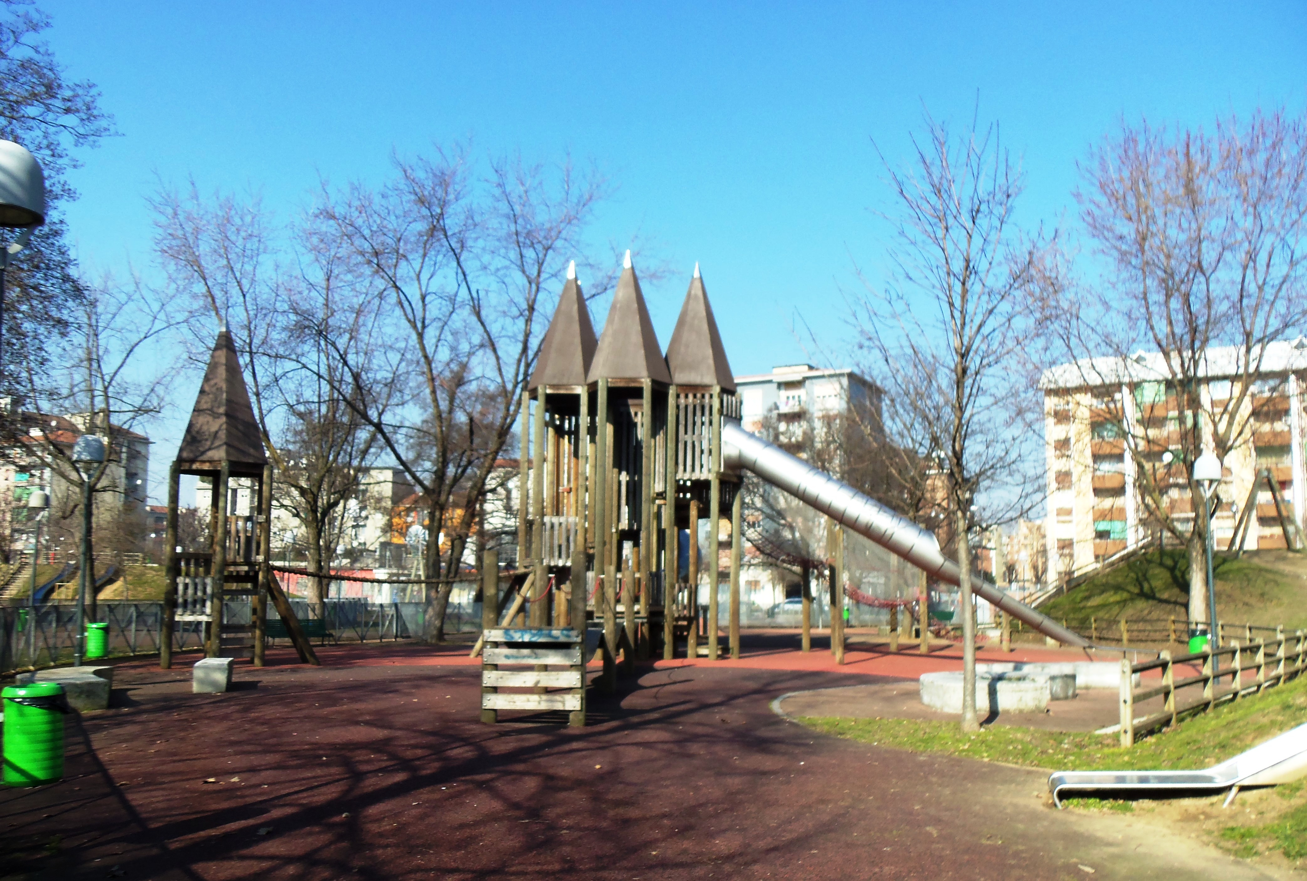 Yorick39 ownwork 2011.2 Milano, Alessandrini park, the children's playcourt GDFL e Creative Commons CC-BY-SA-3.0, sono l'autore